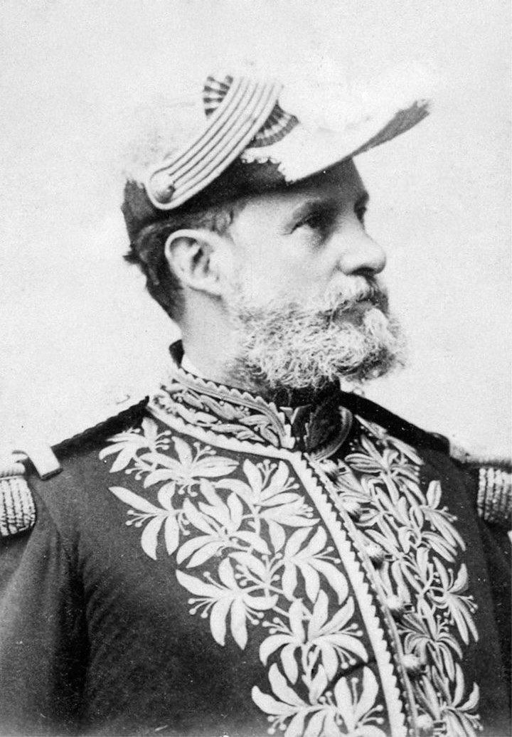 Antonio Basilio Cuervo Urisarri, Colombian politician.